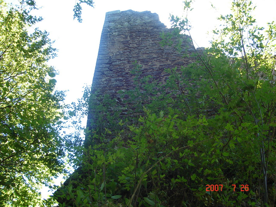 Bálványosi várrom, Székelyföld